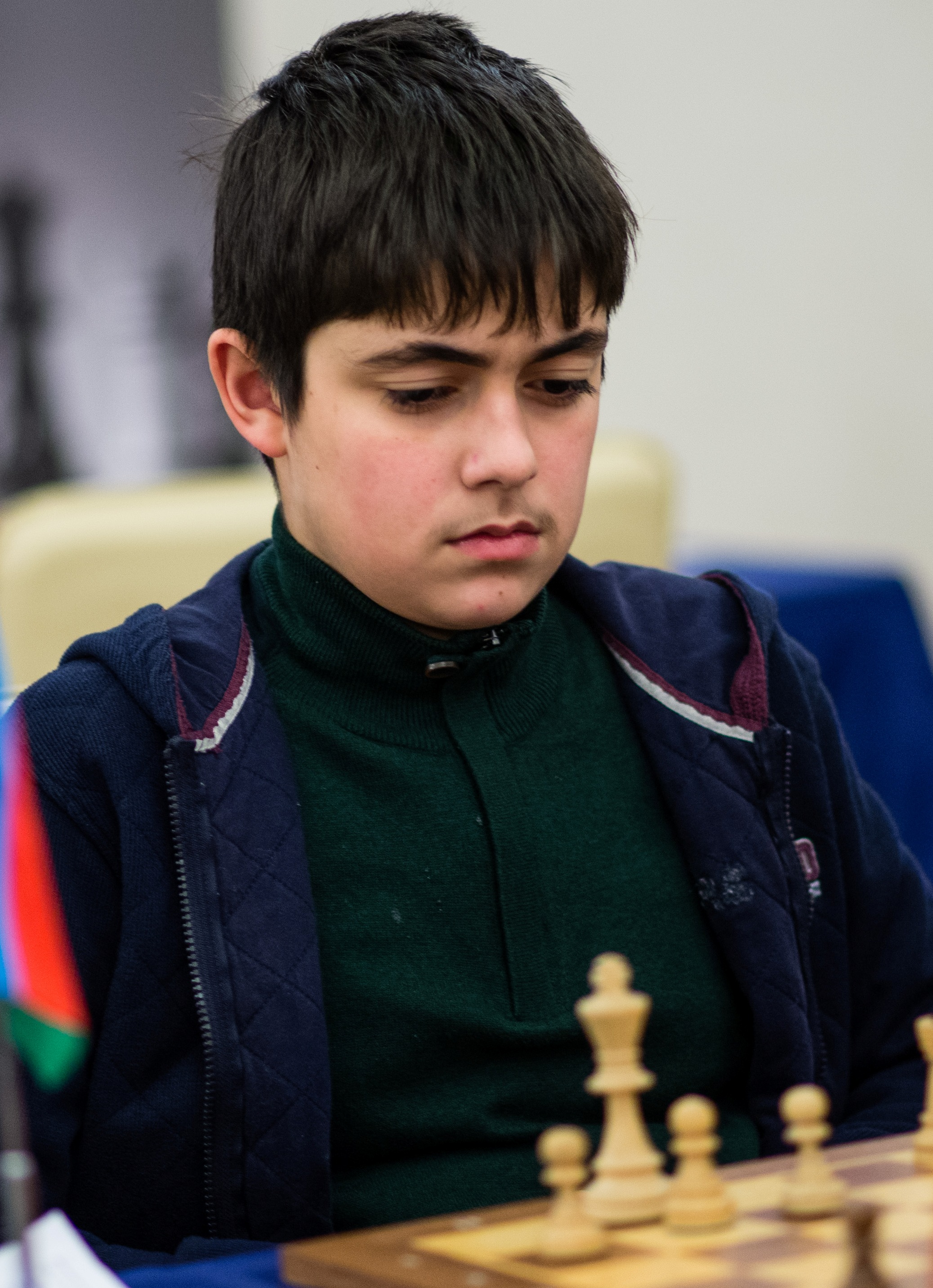 Məhəmməd Muradlı